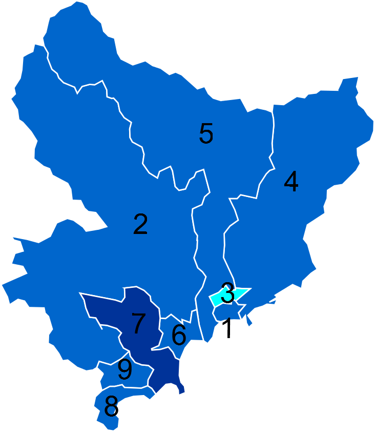 Résultats des élections législatives des Alpes-Maritimes en 2012